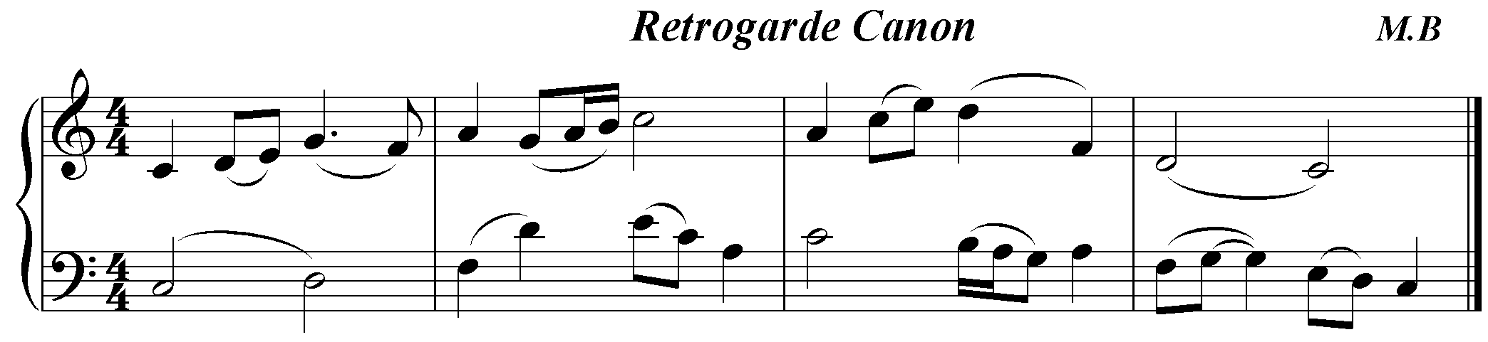 کانن قهقرائی یا آینه وار در فرم موسیقی